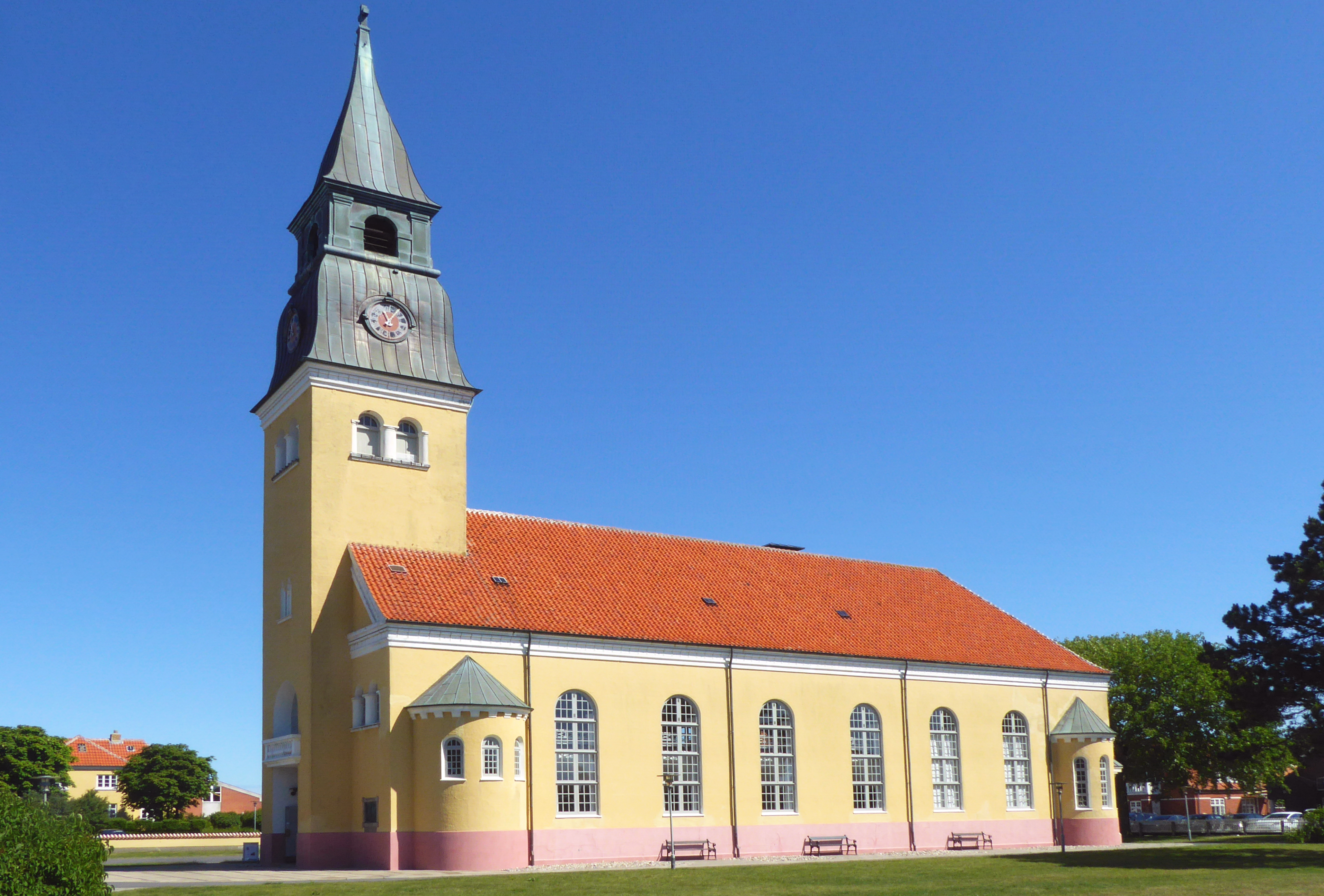 Evangelisch-lutherische Kirche von 1841 (ausgebaut 1910) im Zentrum vom Skagen - Foto 2018 Wolfgang Pehlemann P1220437